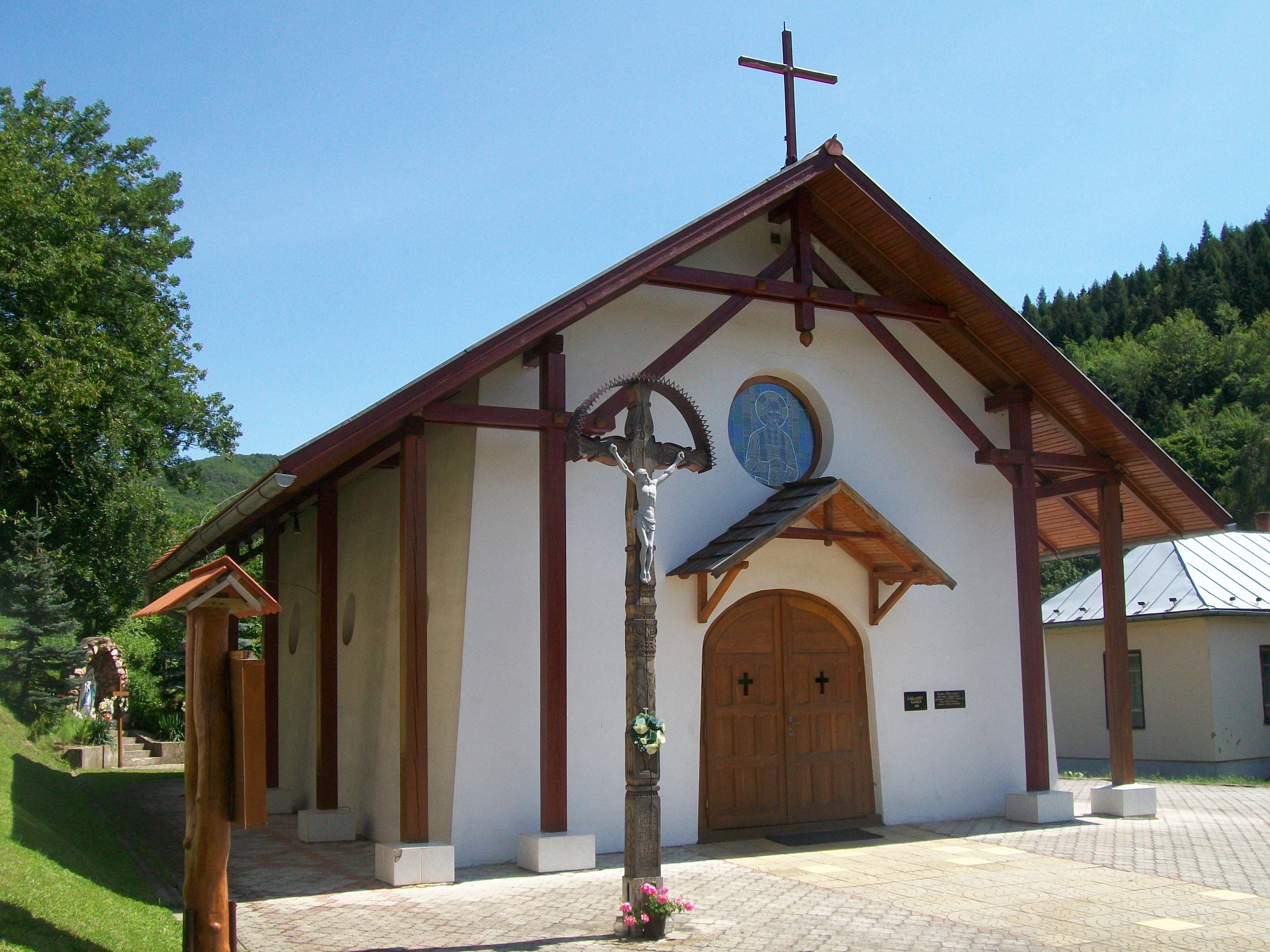 Kaplnka sv. Jána Vianney postavená v Dolnej Bzovej bola posvätená 7. 11. 1999 diecéznym biskupom rožňavským Mons. Edvardom Kojnokom